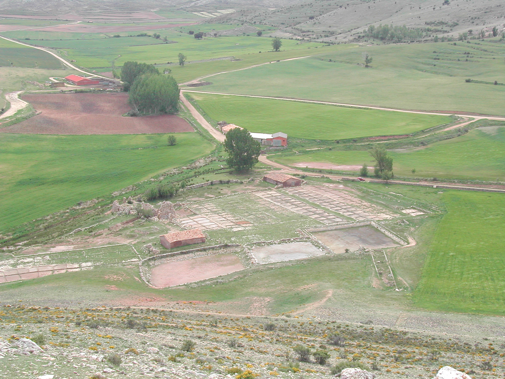 Panorámica de las salinas de Ojos Negros